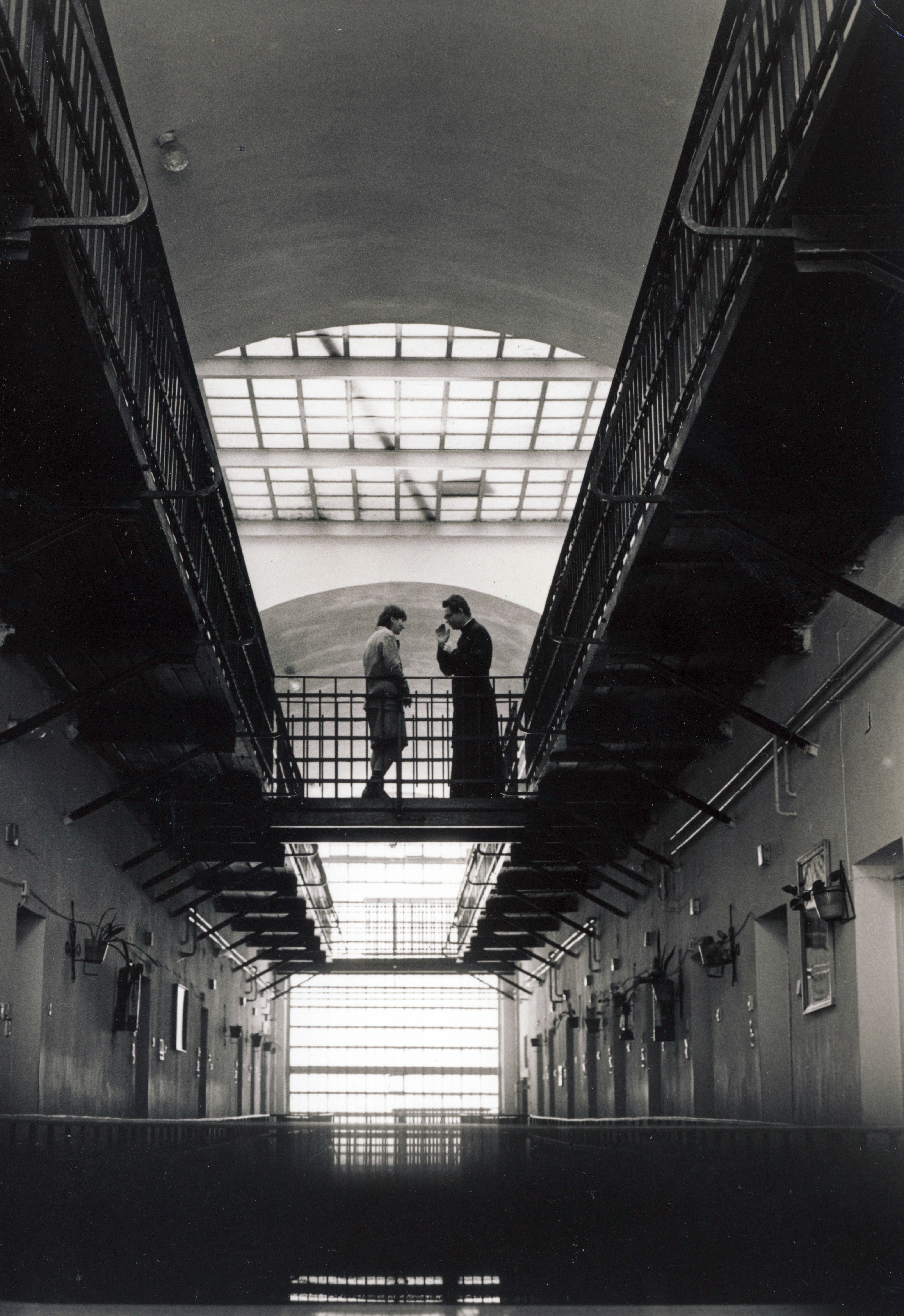 Kalocsai Fegyház és Börtön. Location: Hungary, Kalocsa Tags: priest, prison Title: Kalocsai Fegyház és Börtön.